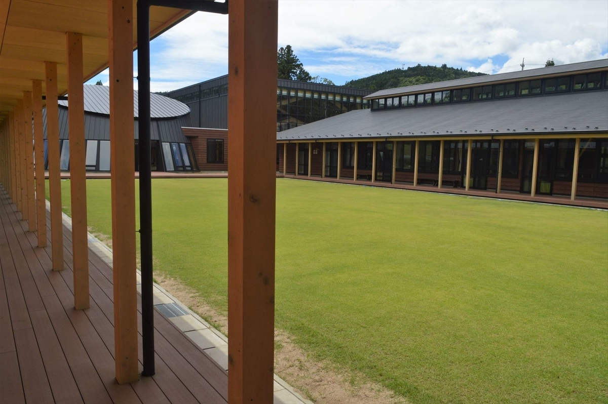 愛知県新城市にある新城市立作手小学校。